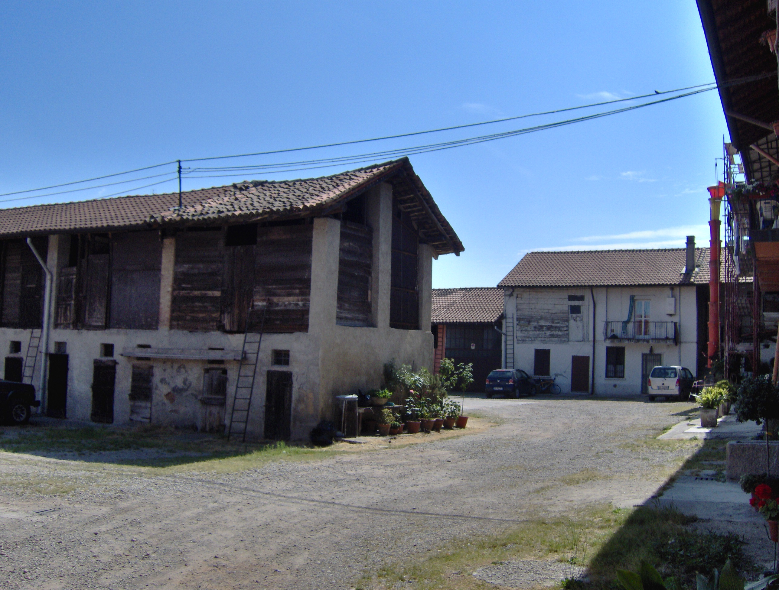 Cascina Guascona-cortile